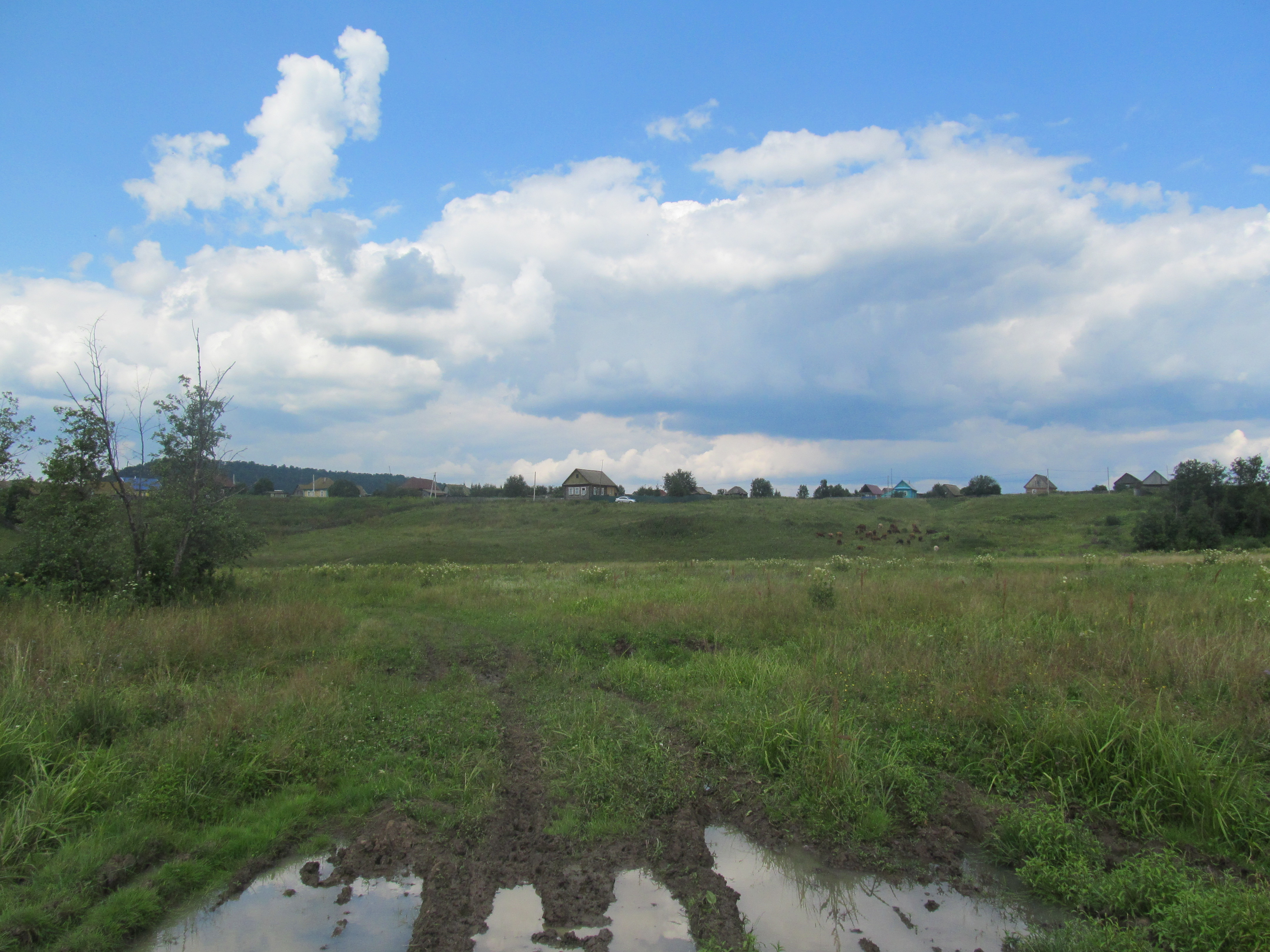 Башҡортса: Архангель районы Үрге Ләмәҙ ауылы күренеше